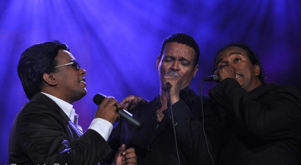 El merenguero dominicano Sergio Vargas durante un concierto de celebracion de sus 25 años en el arte.